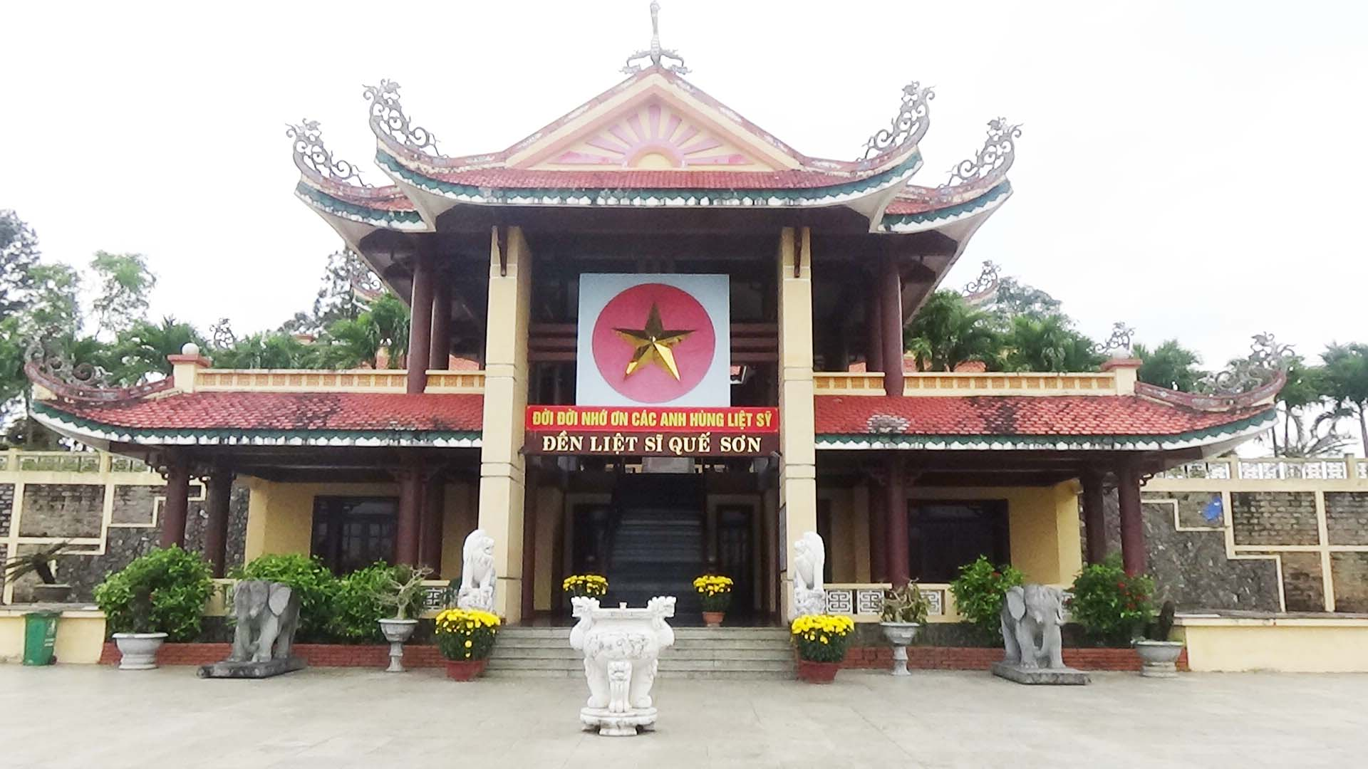 Đền tưởng niệm Liệt sĩ Quế Sơn